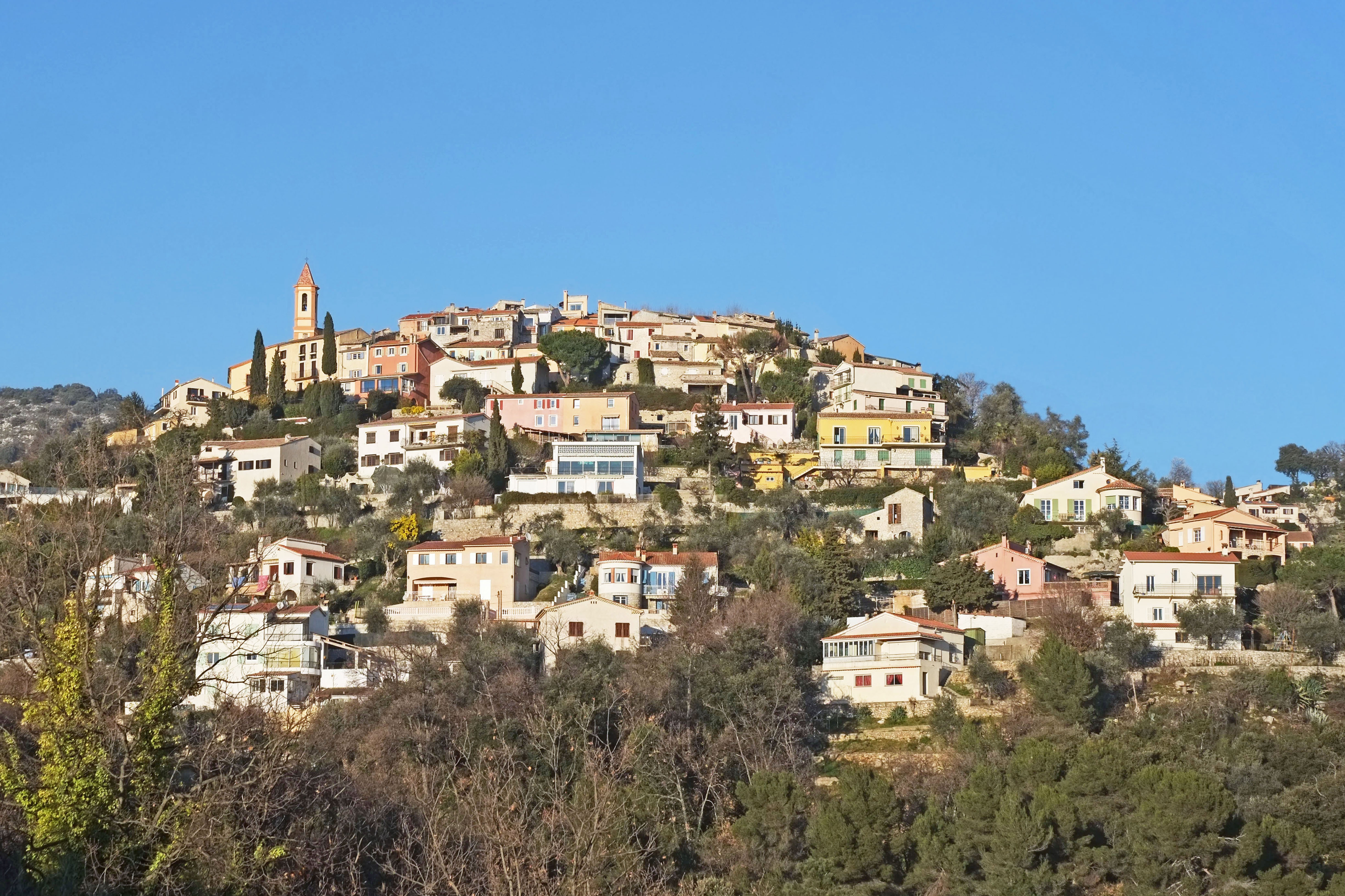 Vue sur le village d'Aspremont en venant de Colomars.